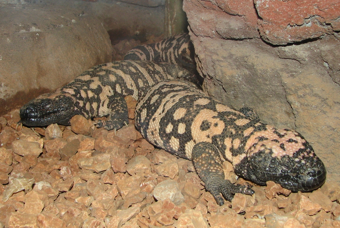 Gila Monsters (Heloderma suspectum)